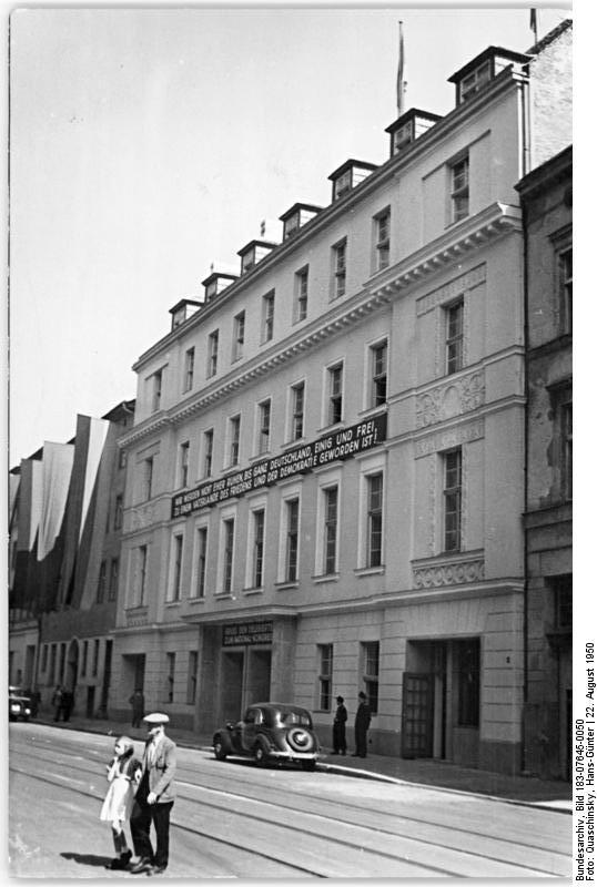 Berlin, Luisenstraße, Volkskammer Das Gebäude der Provisorischen Volkskammer der DDR in der Luisenstrasse in Berlin.Aufn: Illus Quaschinskyinsky